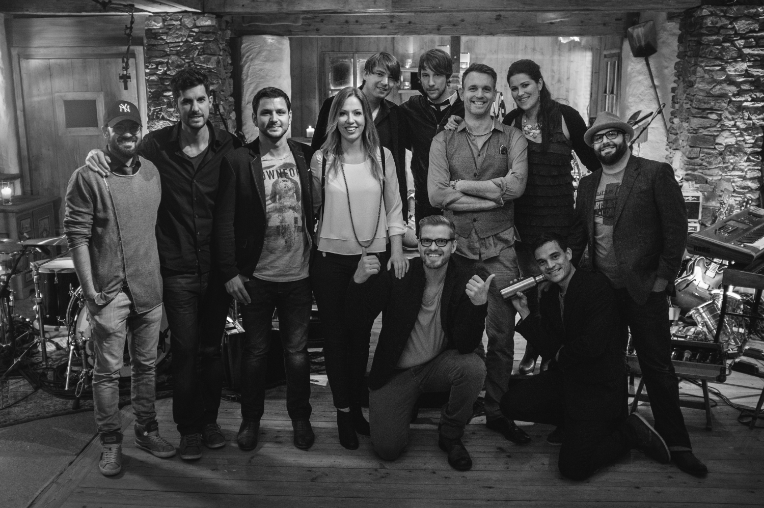 Musikgruppe Grosch's Eleven